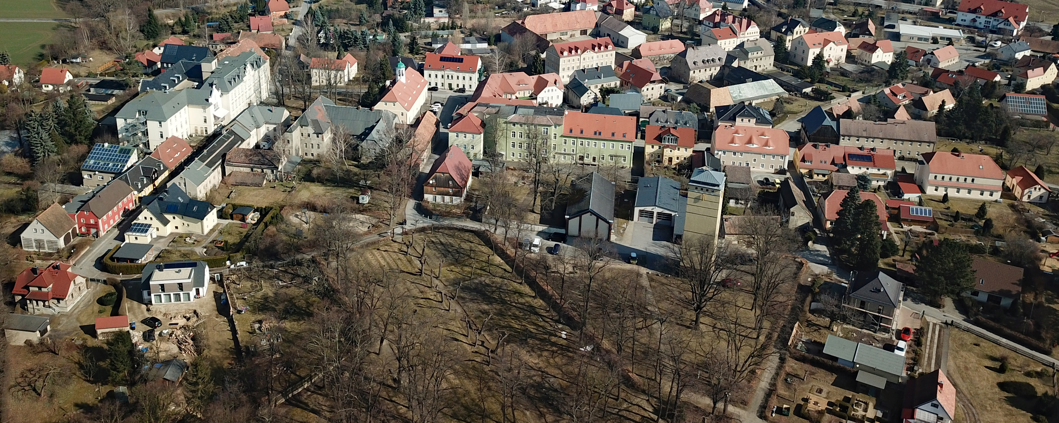 Luftbild der Kolonie Kleinwelka, Ansicht von Süden. Vorn in der Mitte der Gottesacker. Links (groß und weiß) die ehemalige Knabenschule Peter-Buck-Straße 1. Rechts daneben das Schwesternhäuser-Ensemble. Dahinter der Betsaal mit Gemeingarten. Rechts davon (grün) die ehemalige Mädchenschule. Dieses Foto wurde mit einem Quadcopter innerhalb der RMZ des Flugplatzes EDAB aufgenommen. Der Flugleiter wurde am Aufnahmetag telephonisch über Ort und Zeit informiert und hat zugestimmt. Der Flug erfolgte auf Grundlage der Allgemeinverfügung der Landesdirektion Sachsen zur Erteilung der Betriebserlaubnis für unbemannte Luftfahrtsysteme und Flugmodelle gemäß § 21a LuftVO und Zulassung von Ausnahmen von Betriebsverboten gemäß § 21b LuftVO für den Freistaat Sachsen.